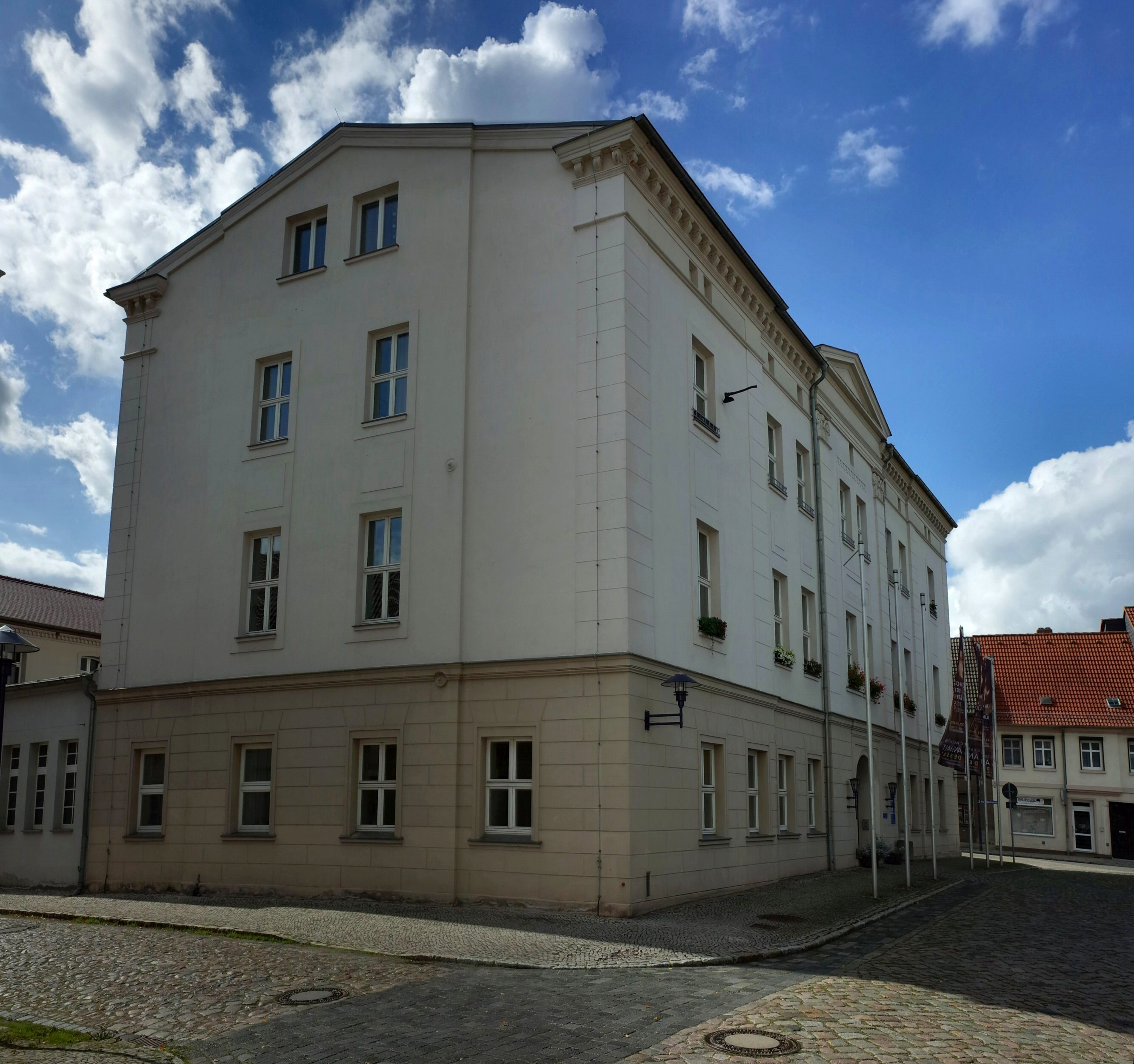 Dessau-Roßlau, Ortsteil Roßlau, Markt 5, Rathaus (Baudenkmal im Denkmalverzeichniss Sachsen-Anhalt, Erfassungsnummer: 094 71535 000 000 000 000 [1])